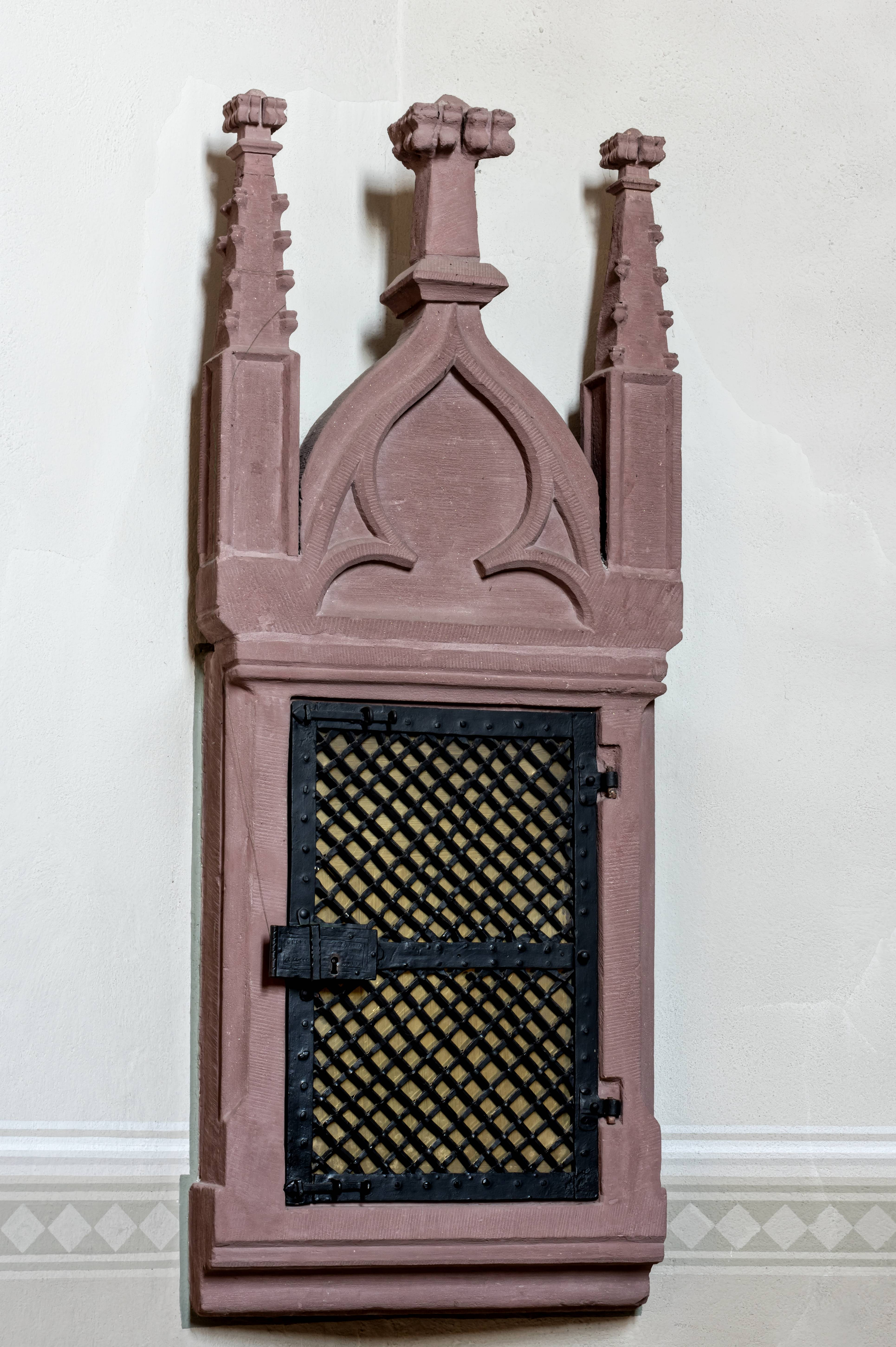 St. Agatha in Grunern, einem Teilort von Staufen